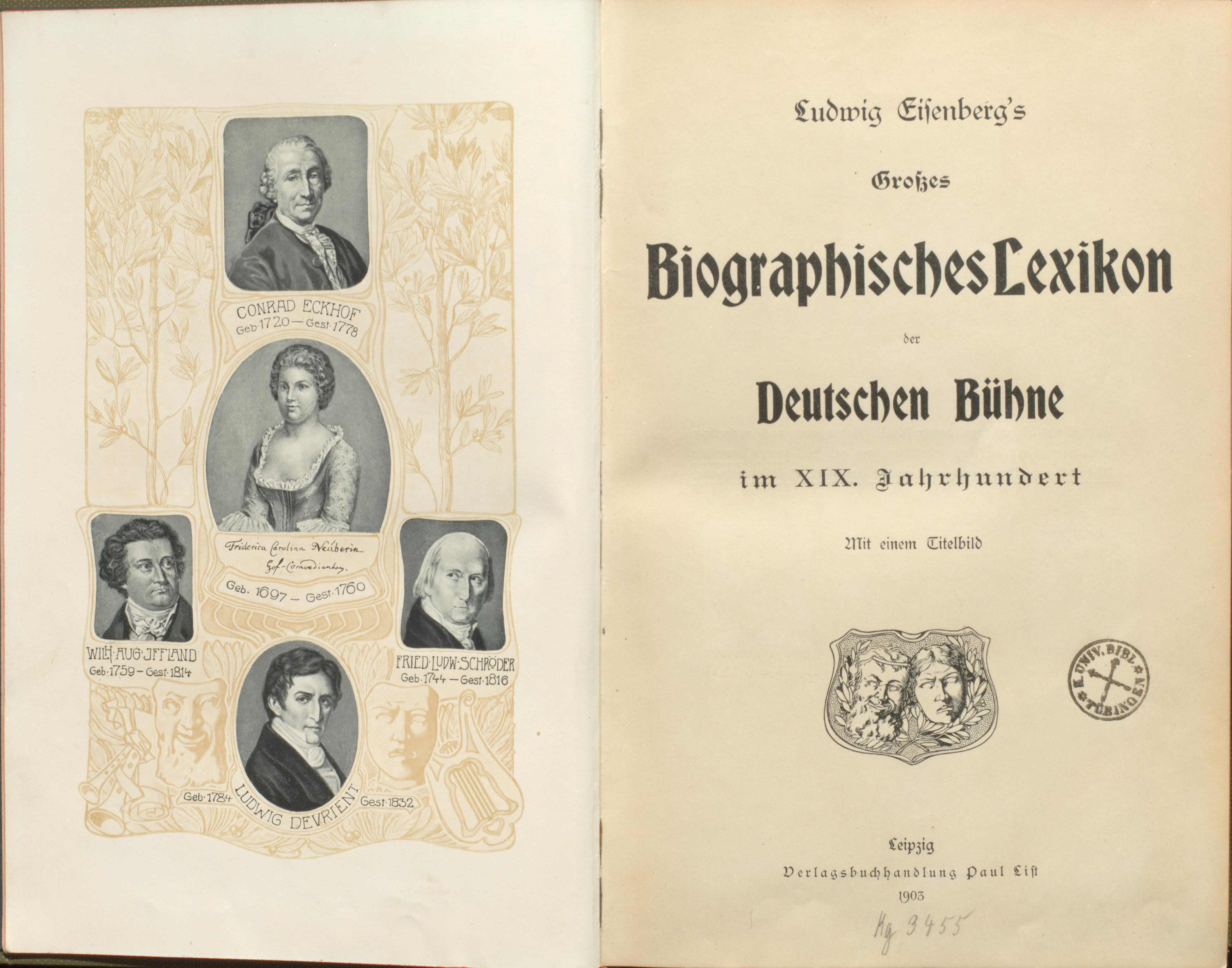 Ludwig Eisenberg's Großes Biographisches Lexikon der Deutschen Bühne im XIX. Jahrhundert 1903. Titel und Frontispiz